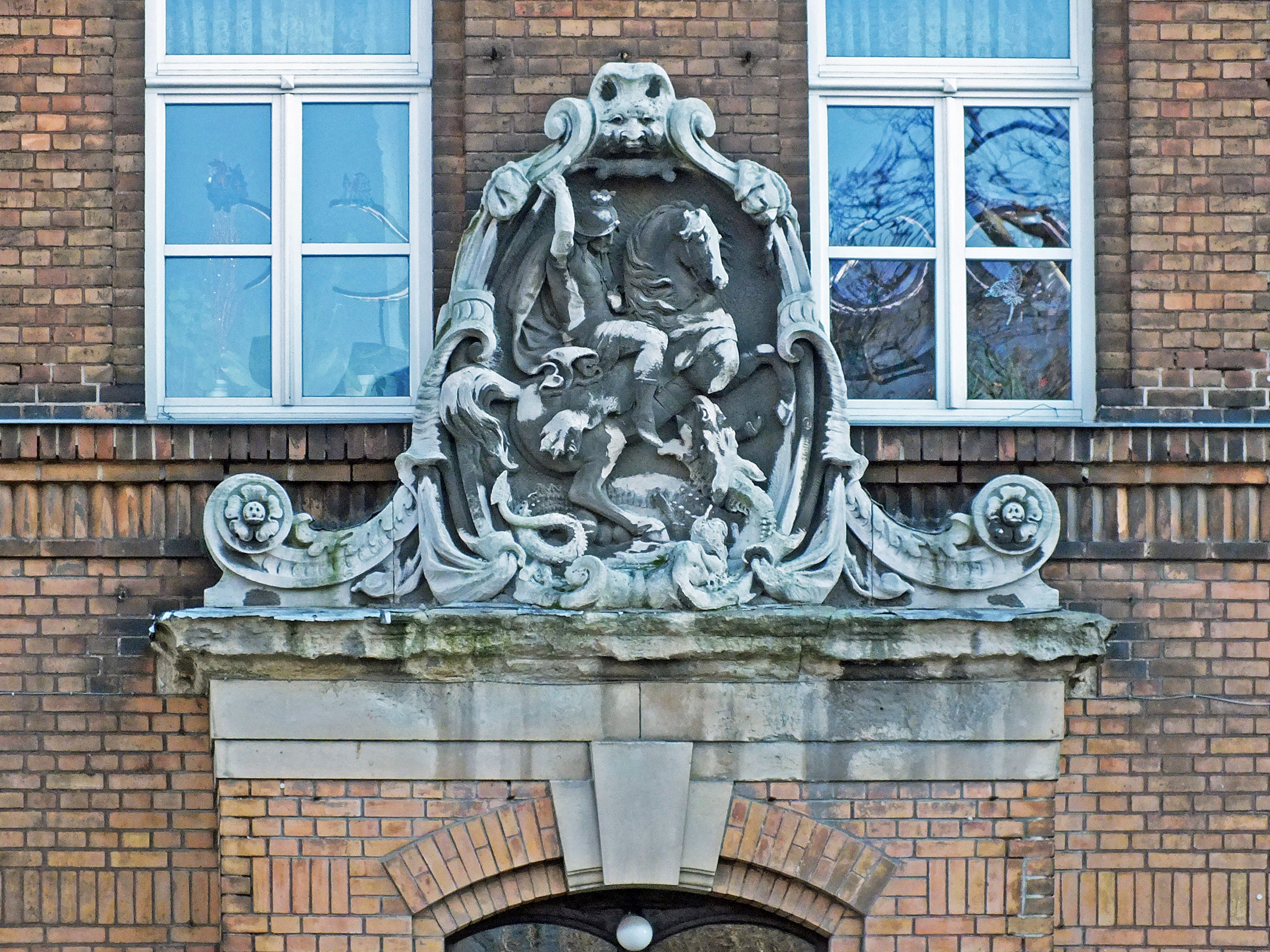 Georgsrelief am Verwaltungsgebäude des Wohnprojektes Riebecksraße in Leipzig (ehemals Zwangsarbeitsanstalt zu St. Georg in Thonberg)